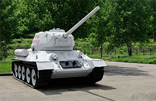 Танк Т-34-85 "Дмитрий Донской"